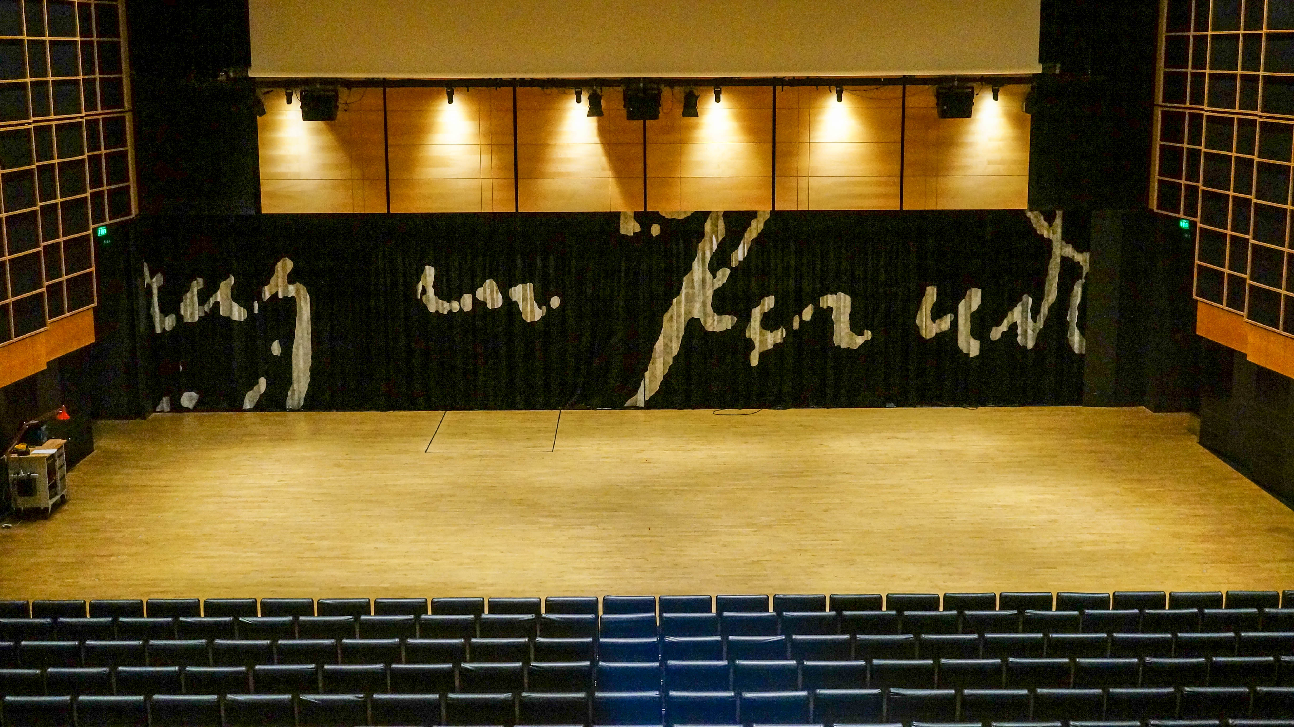 Dronningesalen in Den Sorte Diamant in Copenhagen, Denmark